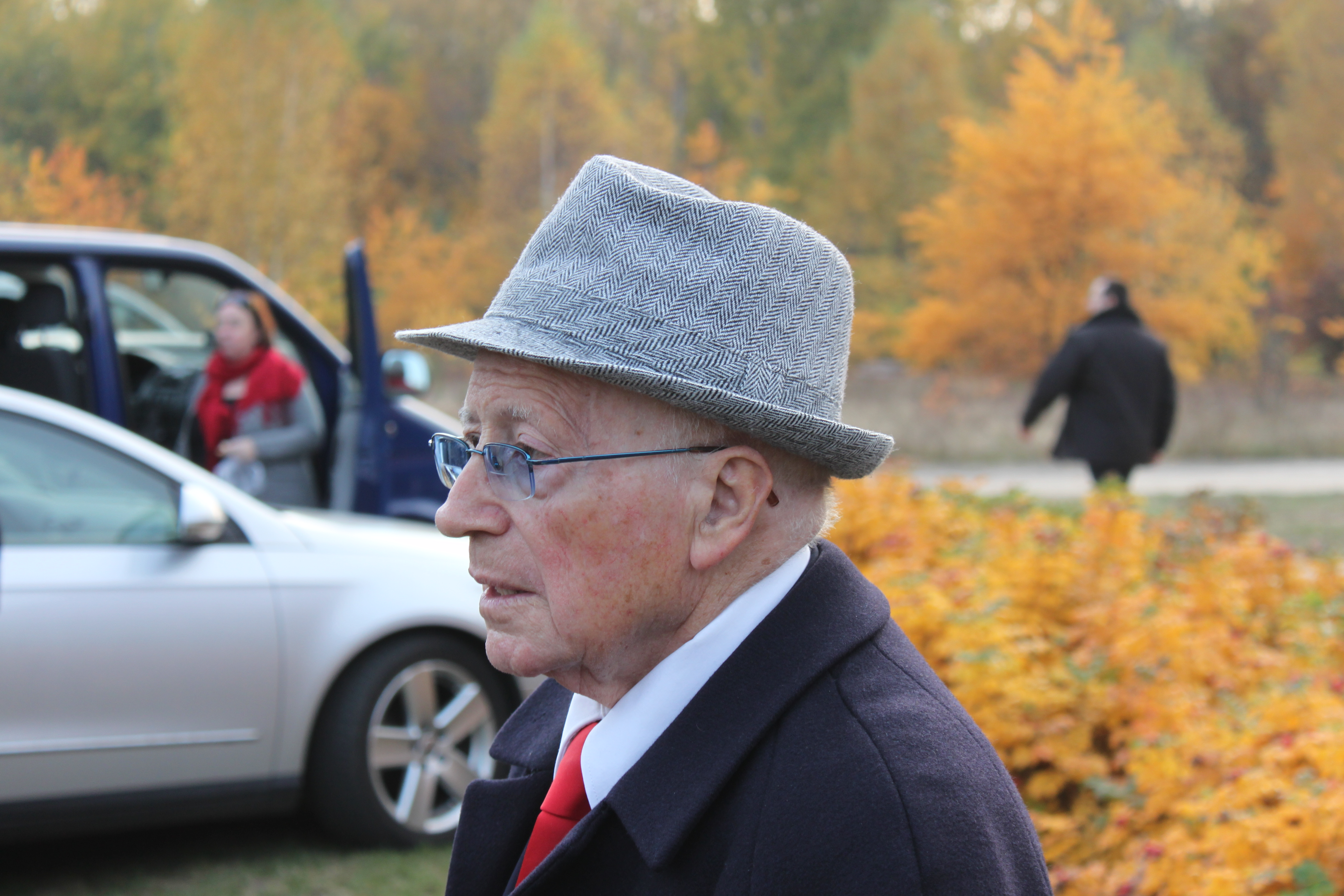 Philip Bialowitz in Sobibor